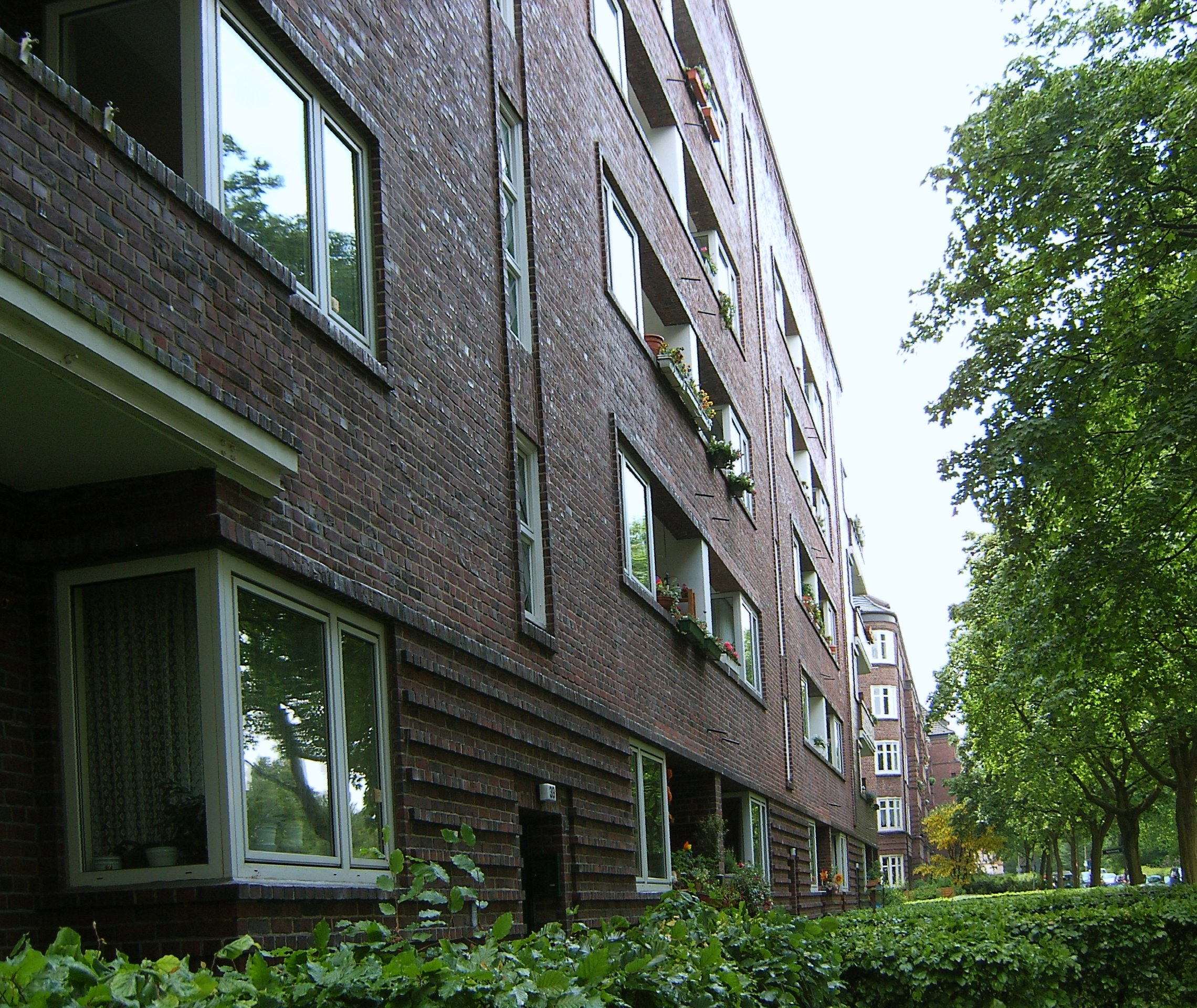 Hamburg, Winterhude, Jarrestadt, Goldbekufer